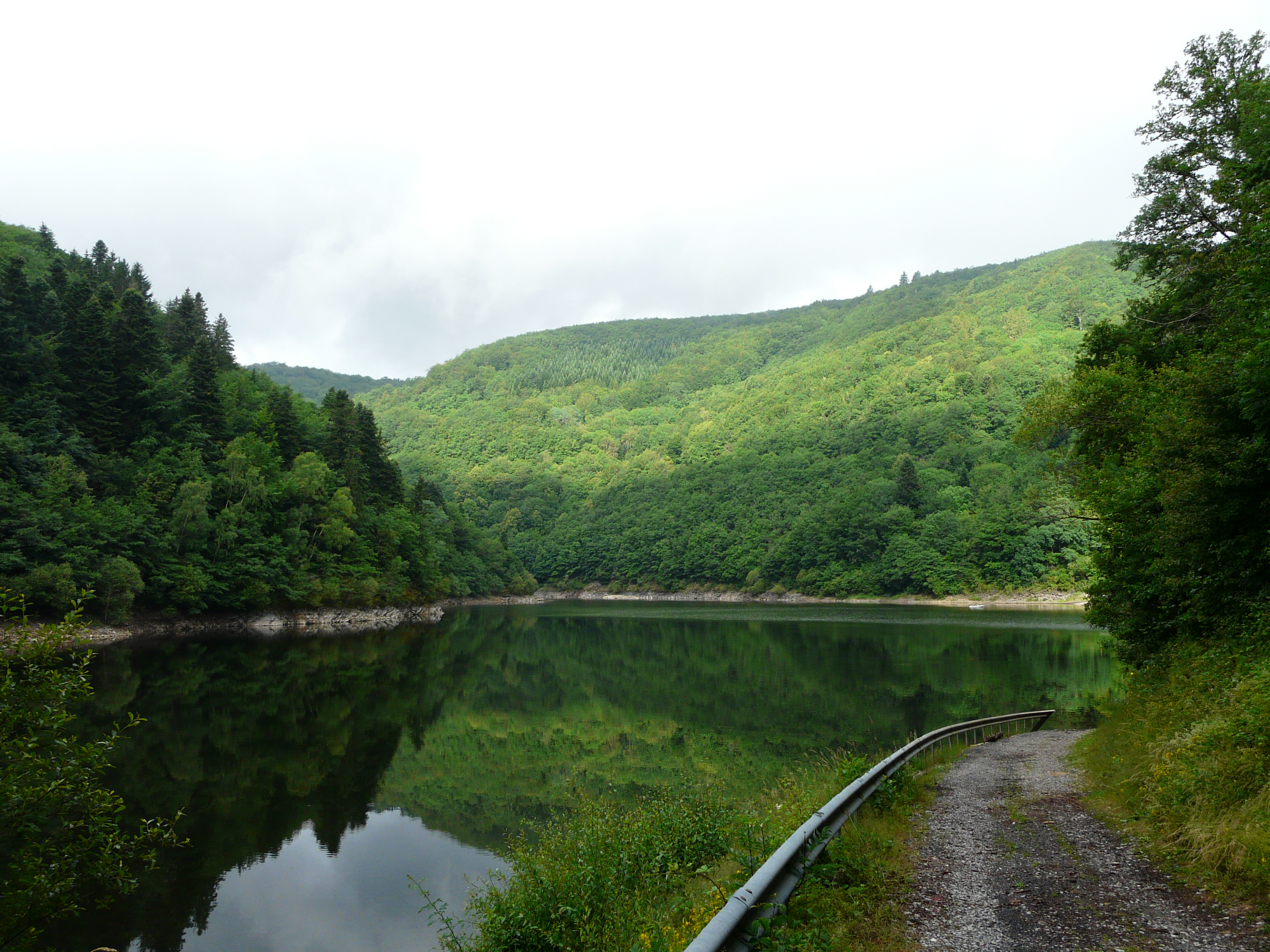 La retenue du lac de Bort-les-Orgues ; au premier plan, la Burande sépare les communes du Puy-de-Dôme (région Auvergne) de Larodde (à gauche) et Singles (à droite) ; à l'arrière plan, la Dordogne et la commune de Confolent-Port-Dieu, en Corrèze (région Limousin).